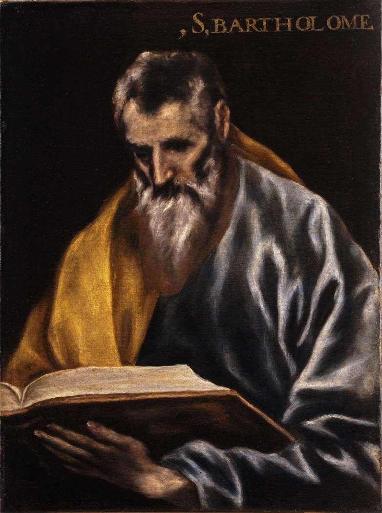 La obra representa al apóstol San Simón, conocido también como Simón el Cananeo o Simón el Zelote. Y aunque en la parte superior del lienzo está colocado un rótulo que lo identifica como el apóstol San Bartolomé, la mayoría de los historiadores coinciden en la actualidad en que representa a San Simón.